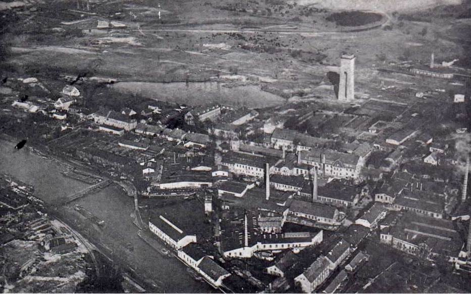 Ortschaft Messingwerk bei Eberswalde am Finowkanal (heute Ortsteil von Eberswalde-Finow), Produktionsanlagen der Hirsch Kupfer- und Messingwerke AG (HKM) mit dem Hafenbecken am Finowkanal und dem 1918 fertiggestellten Wasserturm